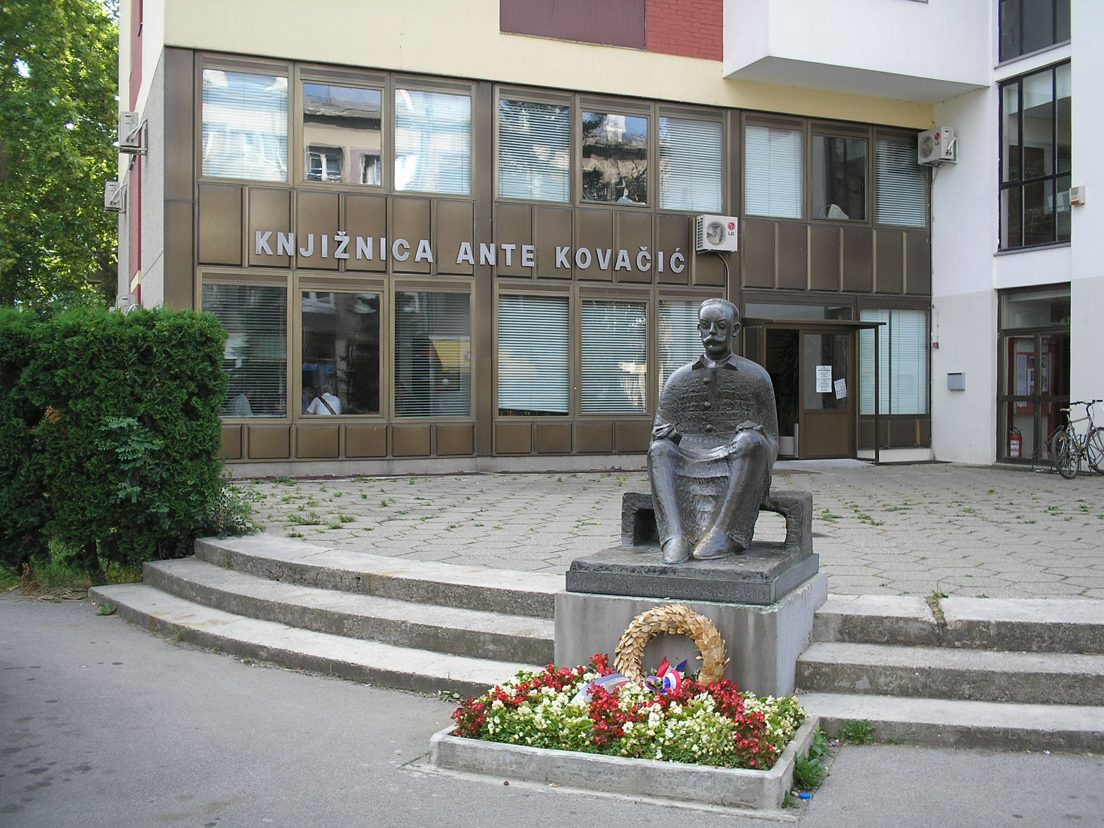 Public library "Ante Kovačić" in Zapresic